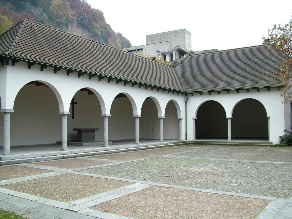 Fürstengruft